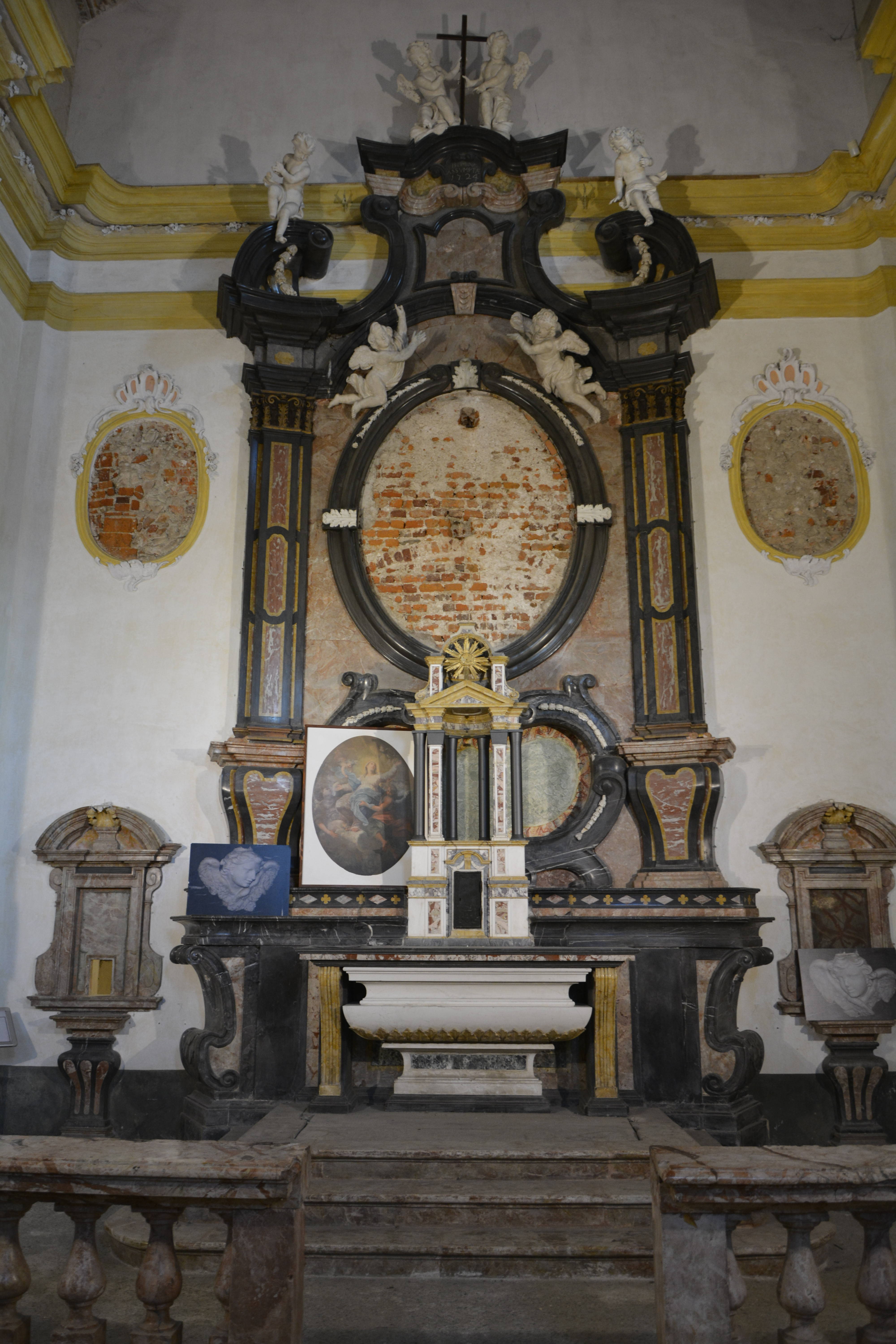 L'altare della chiesa del monastero di Cairate, in provincia di Varese.